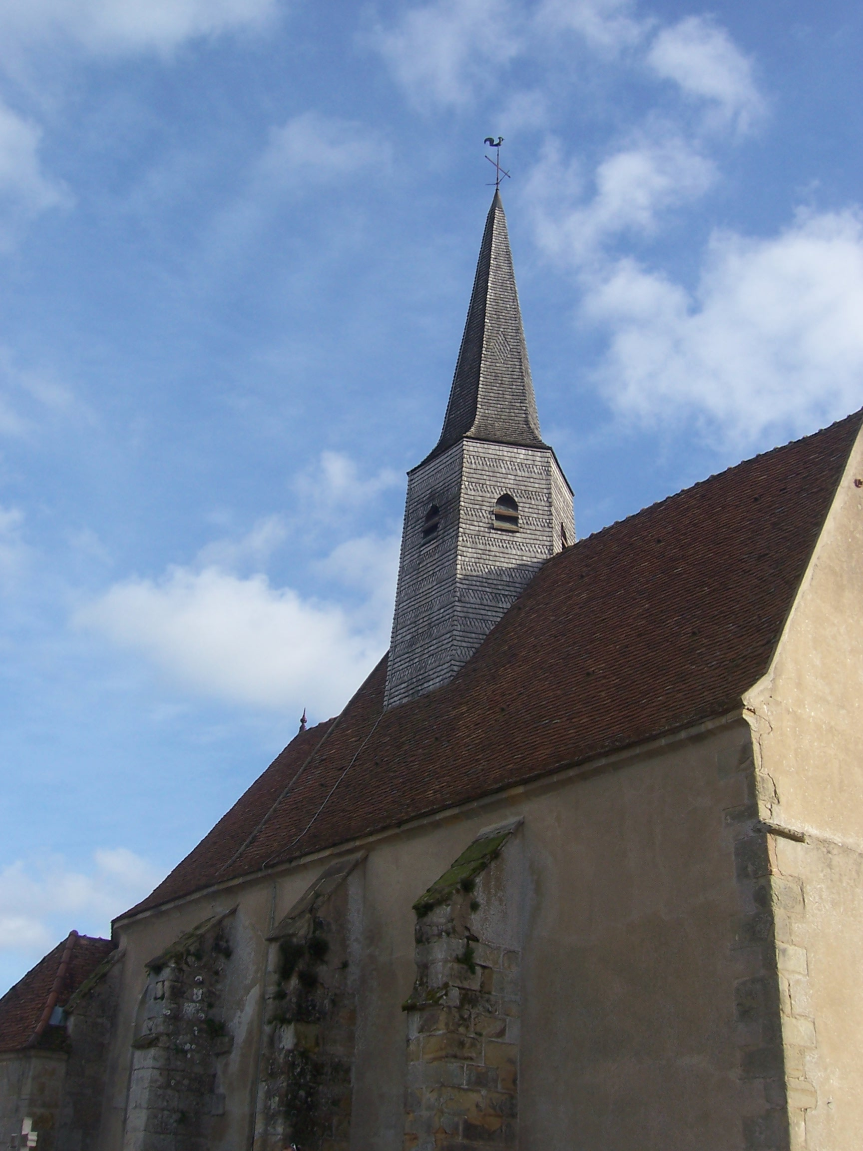 Eglise de Cordesse